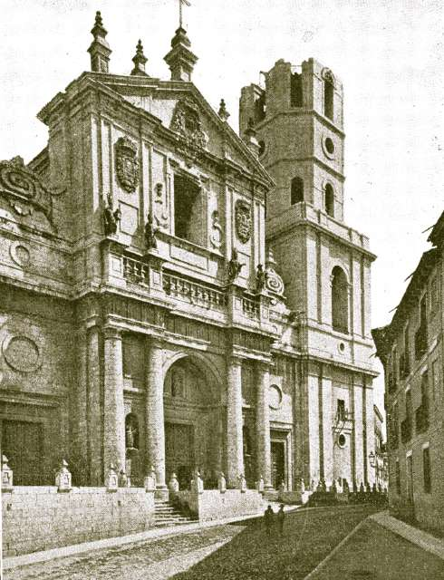 Catedral - Valladolid - Libro Valladolid hace 100 años - Postal B/N